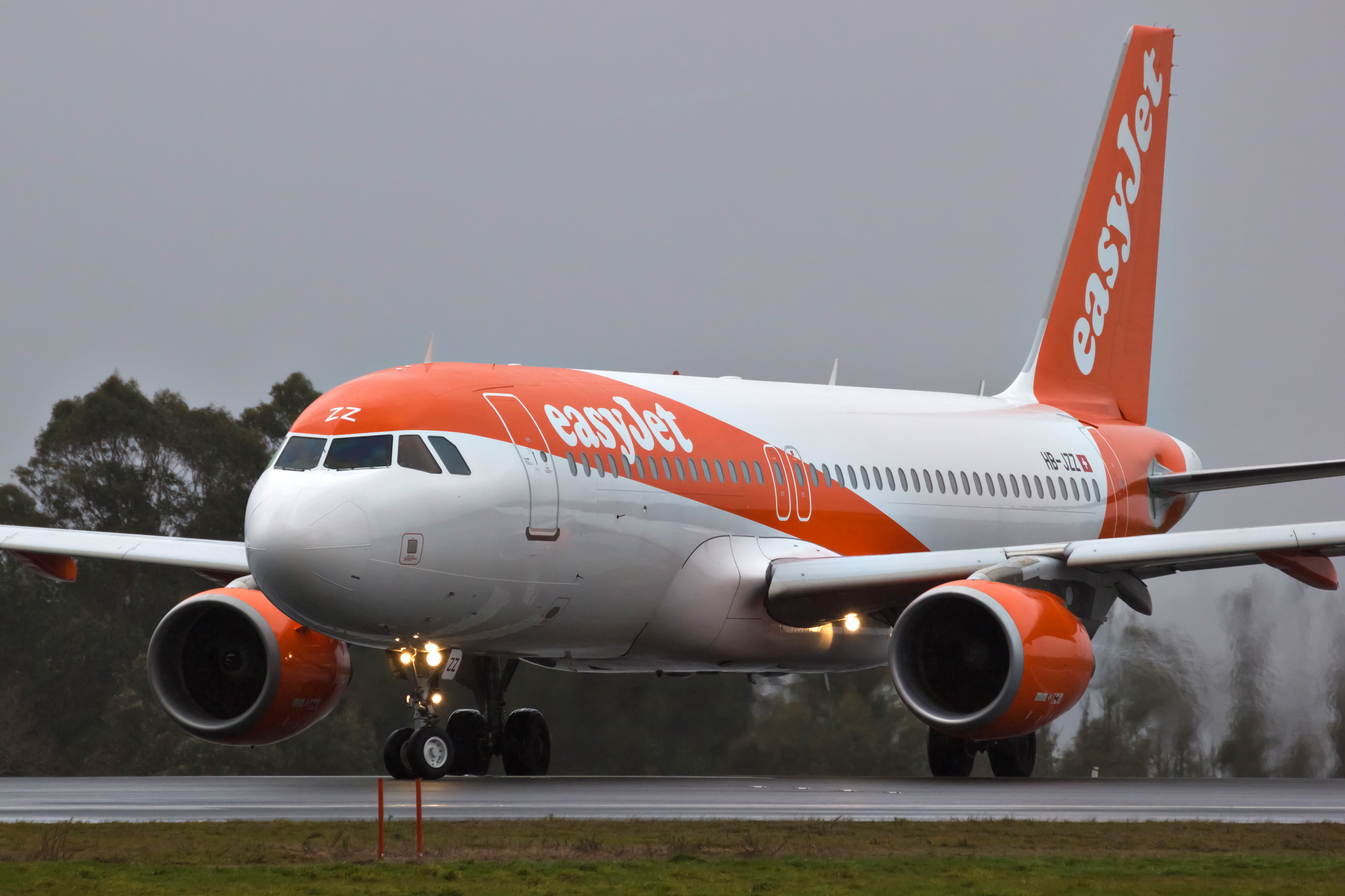 Airbus A320 de easyJet Switzerland despegando do aeroporto de Santiago de Compostela.